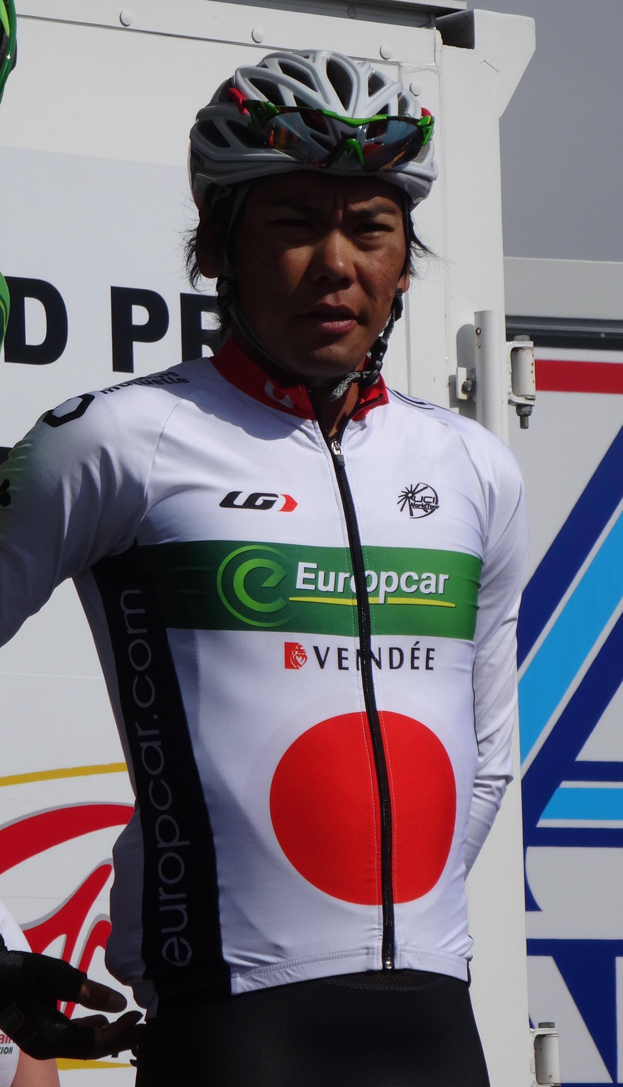 Reportage réalisé le jeudi 17 avril à l'occasion du départ et de l'arrivée du Grand Prix de Denain 2014 à Denain, Nord, Nord-Pas-de-Calais, France.